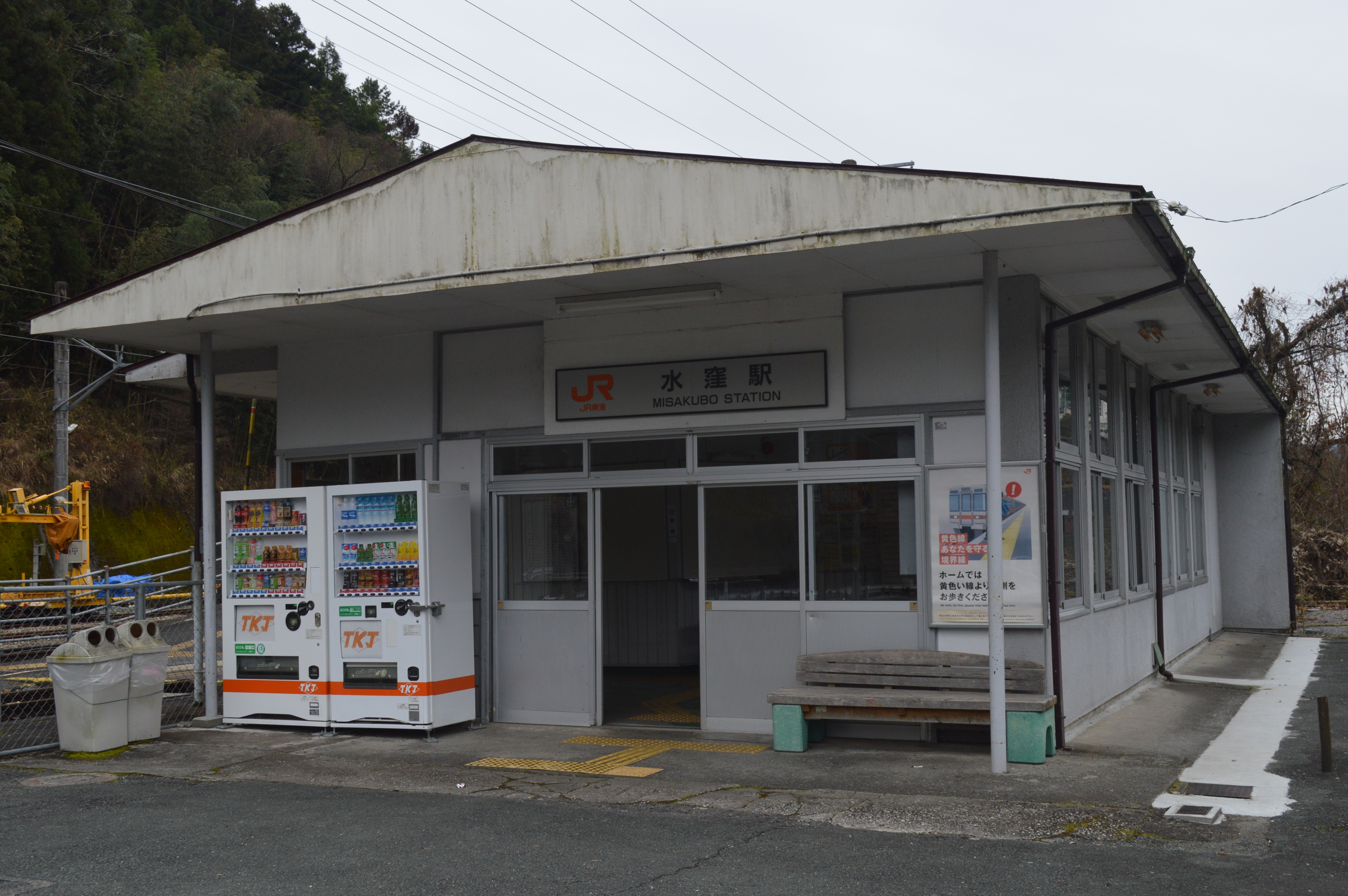 JR飯田線水窪駅。静岡県浜松市天竜区水窪。